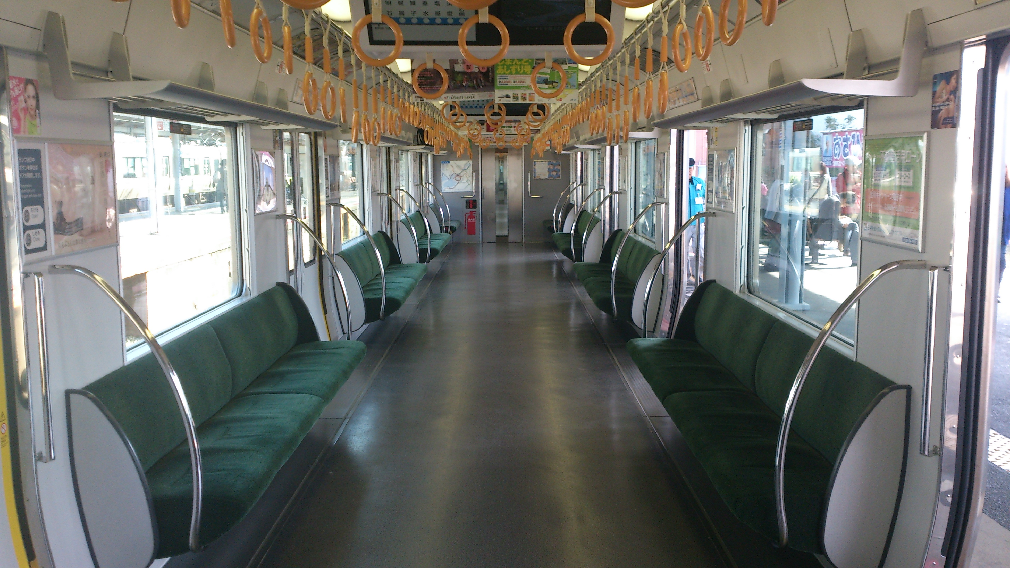 吊り手が黄色のものに増設され、座席が緑になった321系車内。西明石駅にて撮影